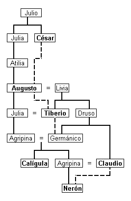 Árbol genealógico simplificado de la dinastía julioclaudia